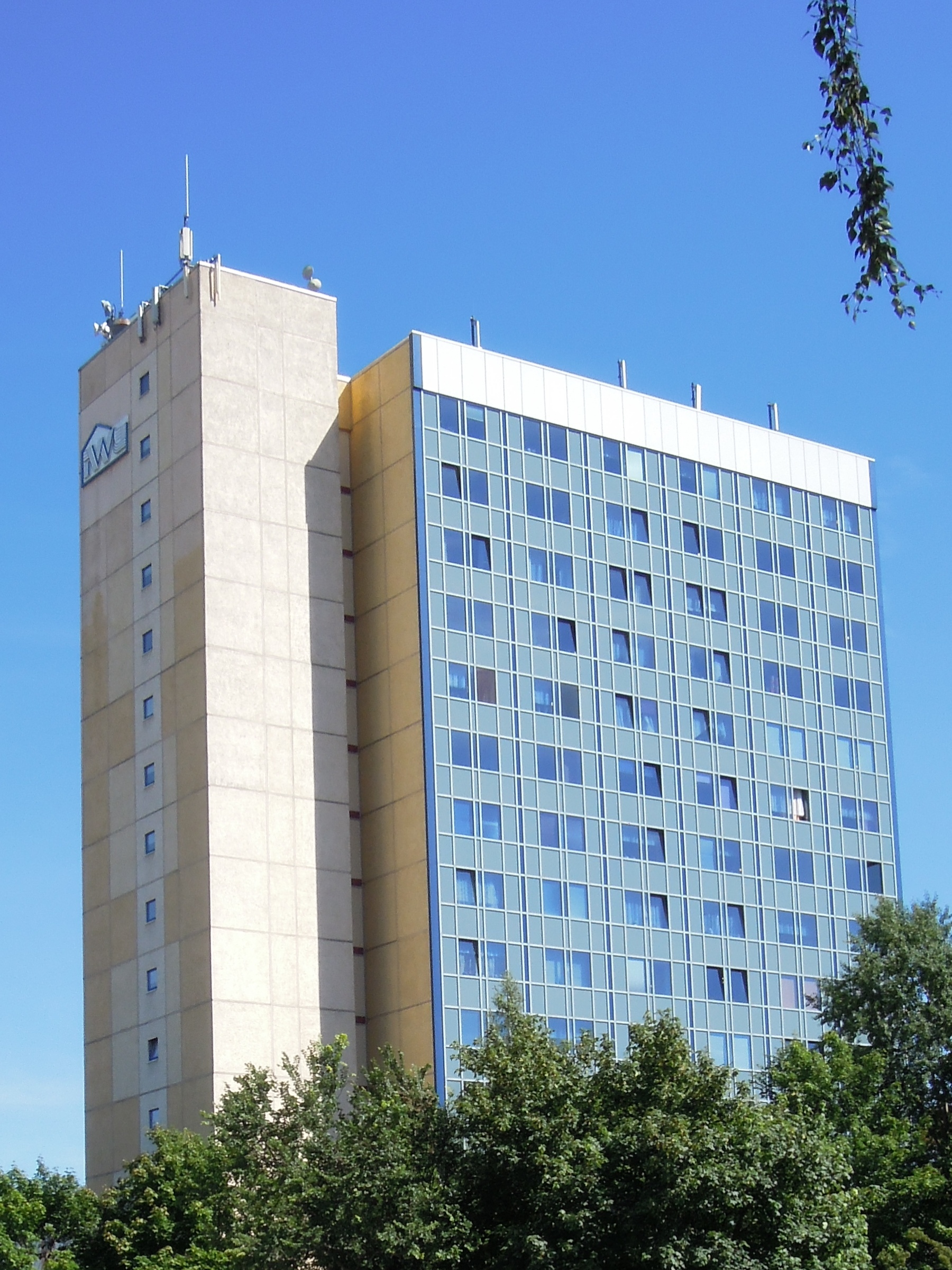 Hochhaus am Stollen in Ilmenau, erbaut 1983, Plattenbau